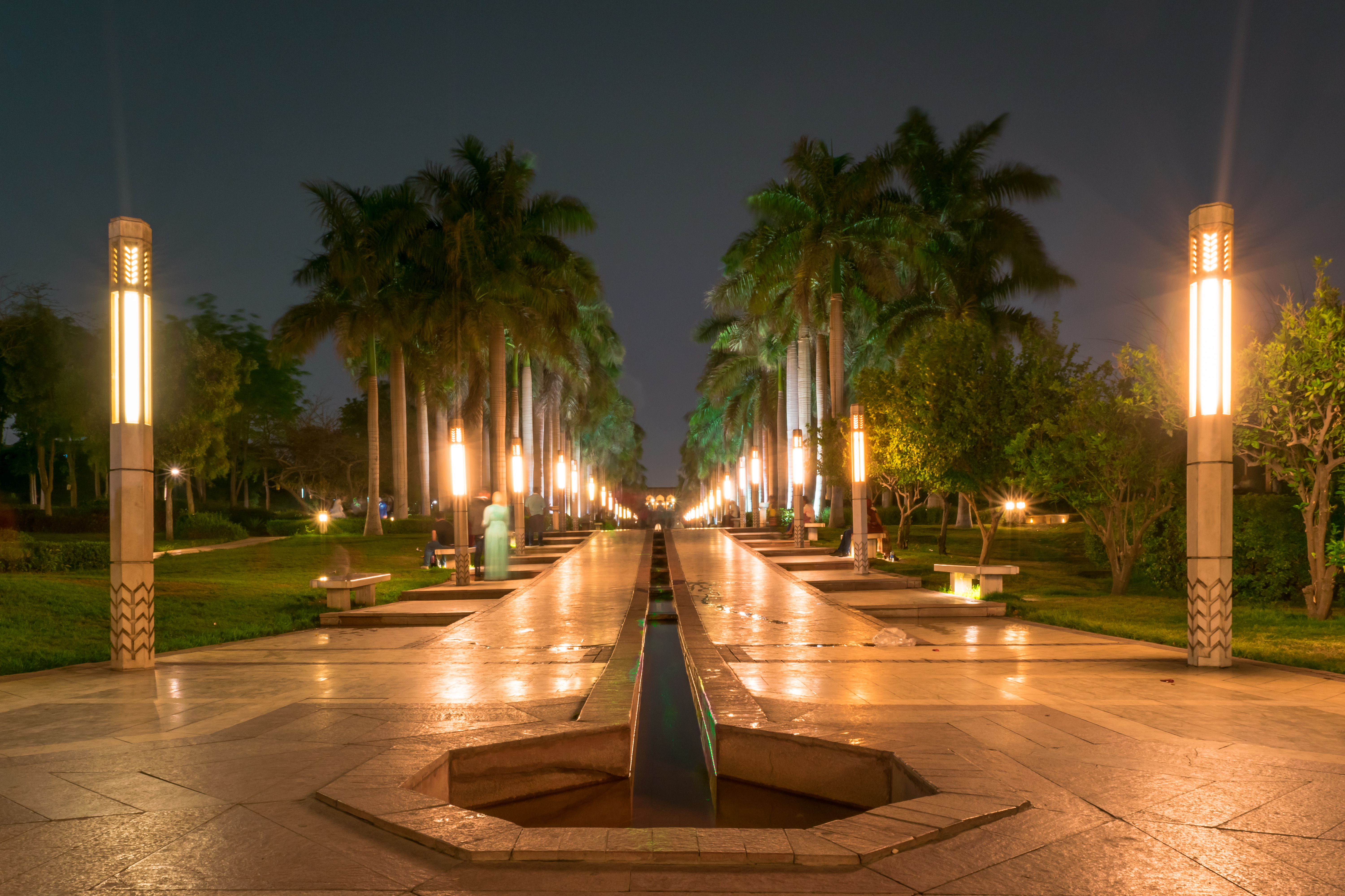 حديقة الازهر ليلا